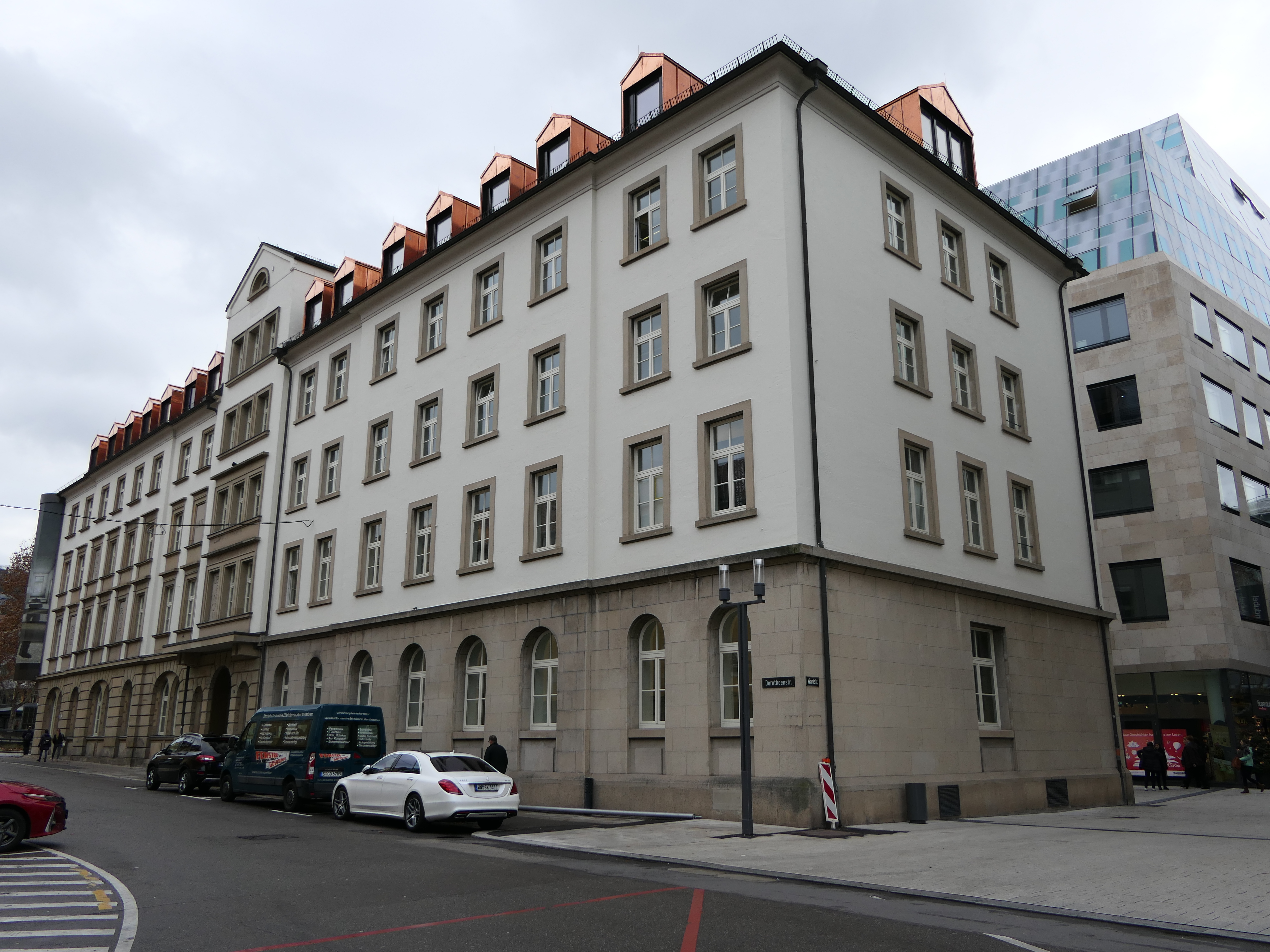 Das Hotel Silber in Stuttgart, nach seinem Umbau.